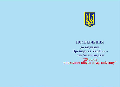 Відзнака Президента України — пам'ятна медаль «25 років виведення військ з Афганістану». Посвідчення (аверс)